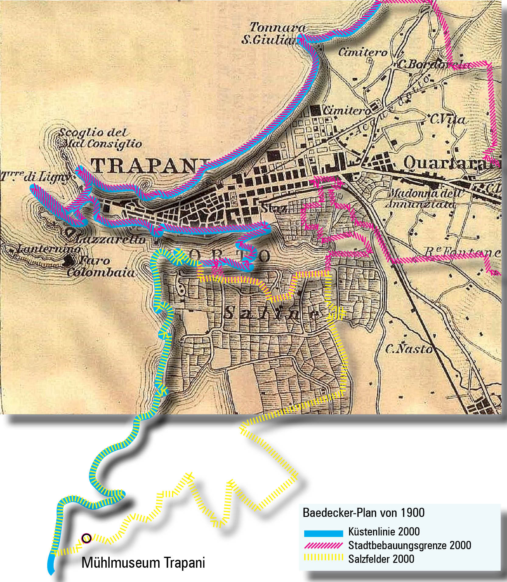 trapani carta antica